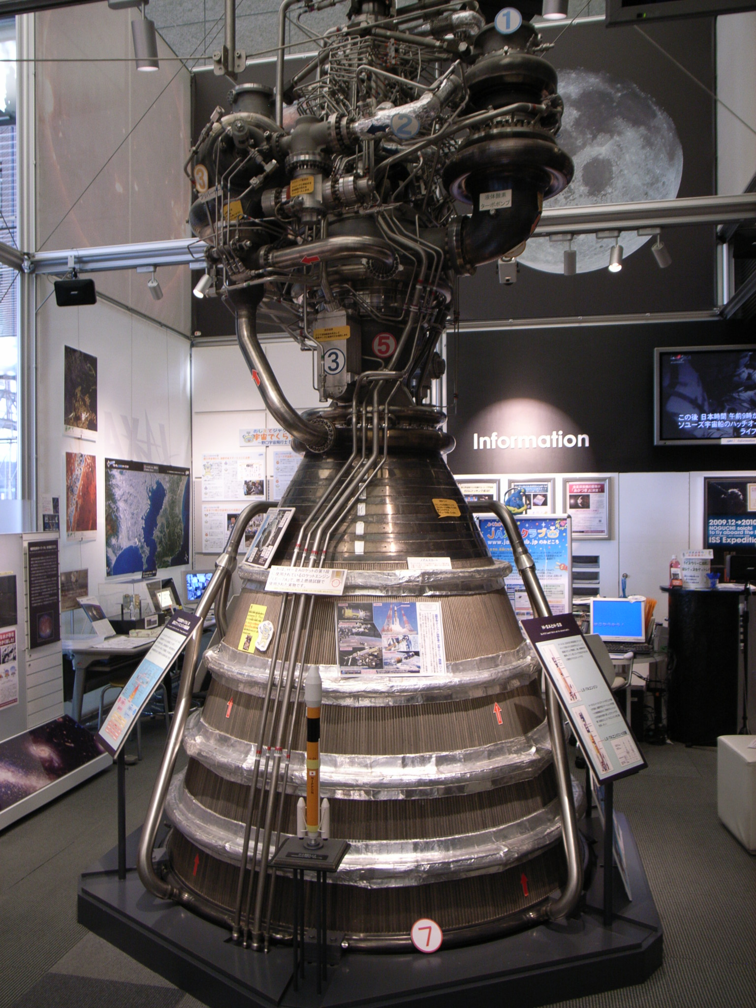 丸の内オアゾのJAXAiで展示されているLE-7Aエンジン